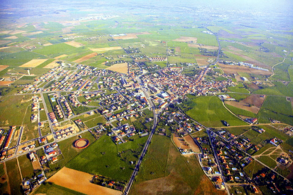 Vista aérea de Morales del Vino